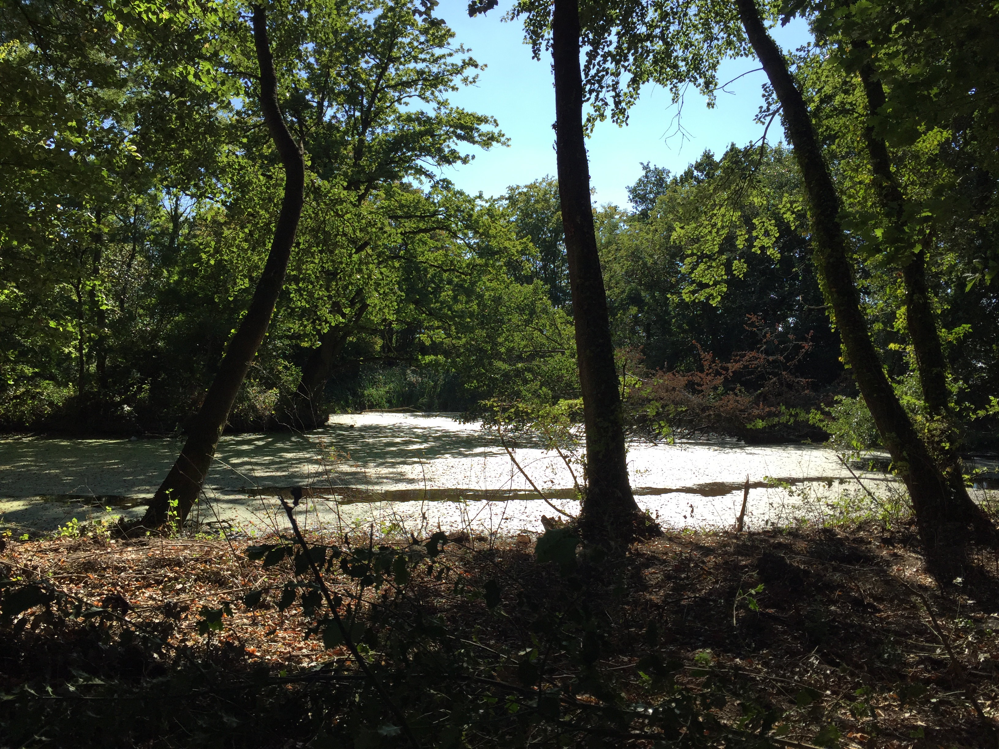 Getrokken in augustus 2018, tijdens een wandeltocht.